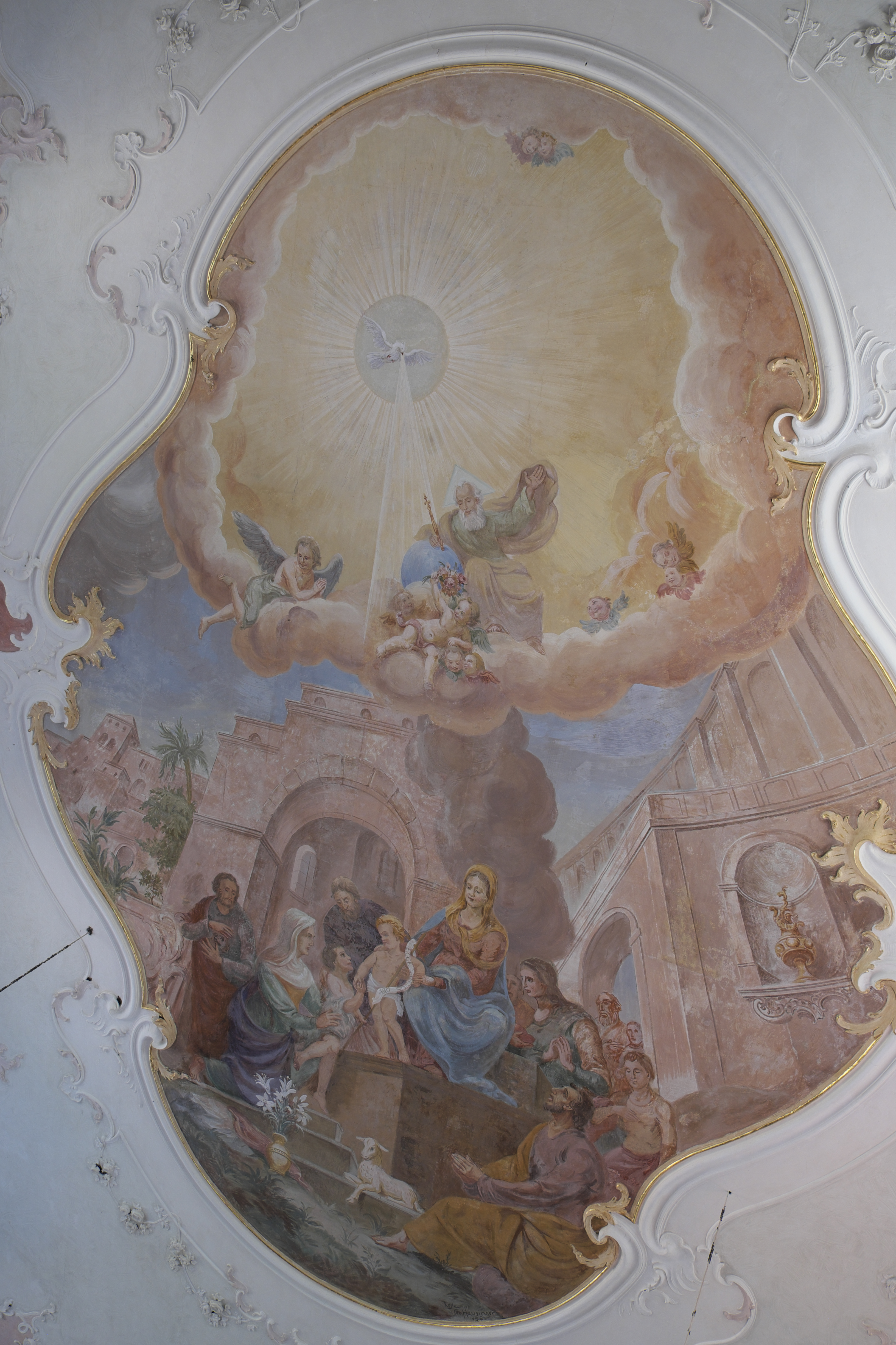 Katholische Filialkirche Unsere Liebe Frau in Petzenhausen, einem Ortsteil von Weil (Oberbayern) im Landkreis Landsberg am Lech (Bayern/Deutschland), Deckenbild im Langhaus aus dem 19./20. Jahrhundert, 1967 restauriert von Sebastian Hausinger